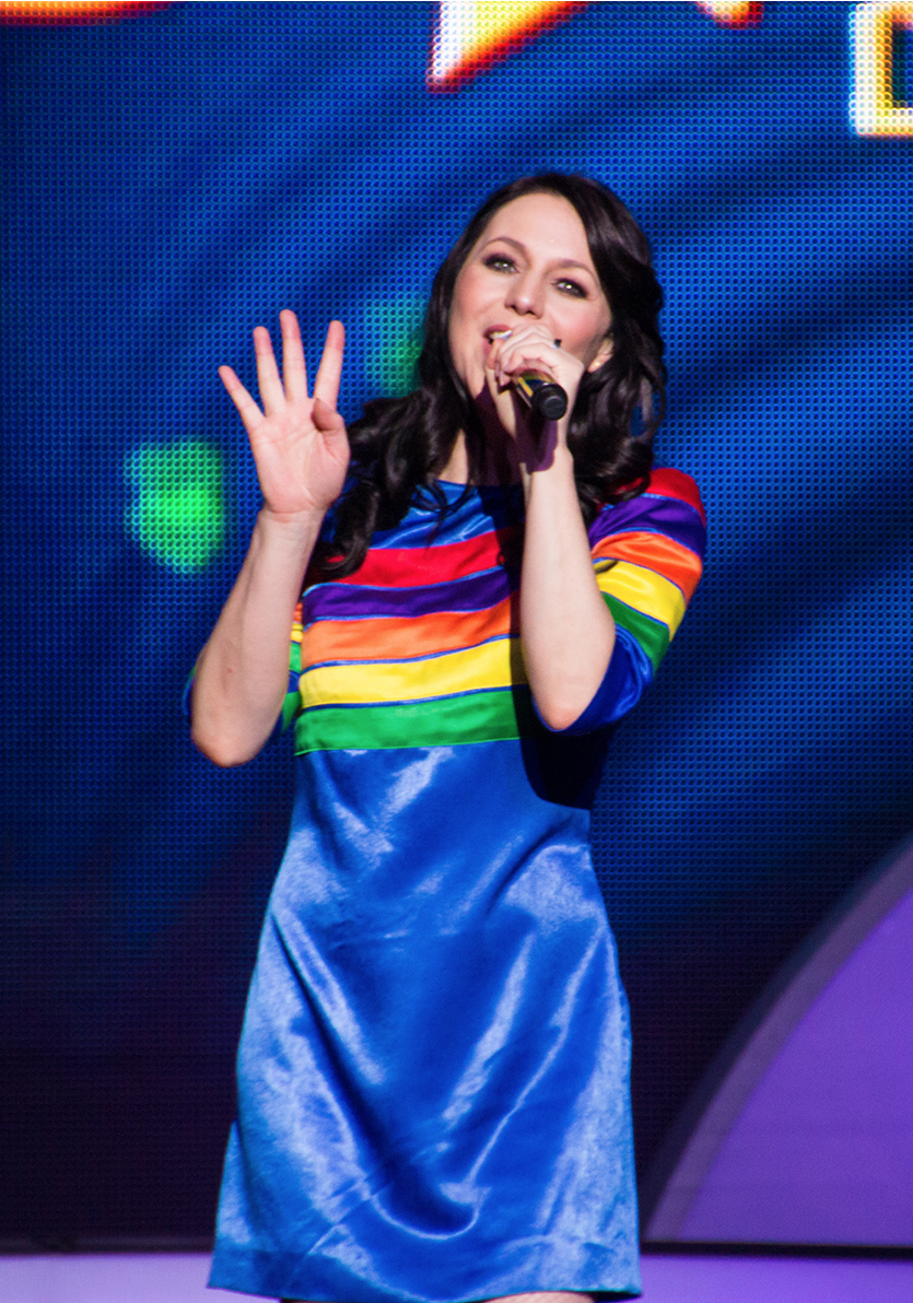 Kristel Verbeke tijdens de afscheidsshow van K3.